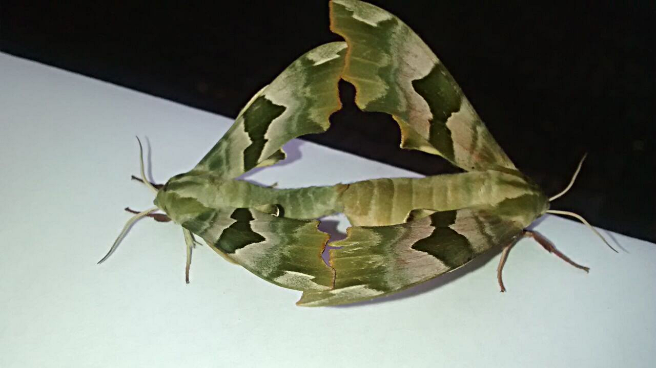 Lindenschwärmer bei der Paaung